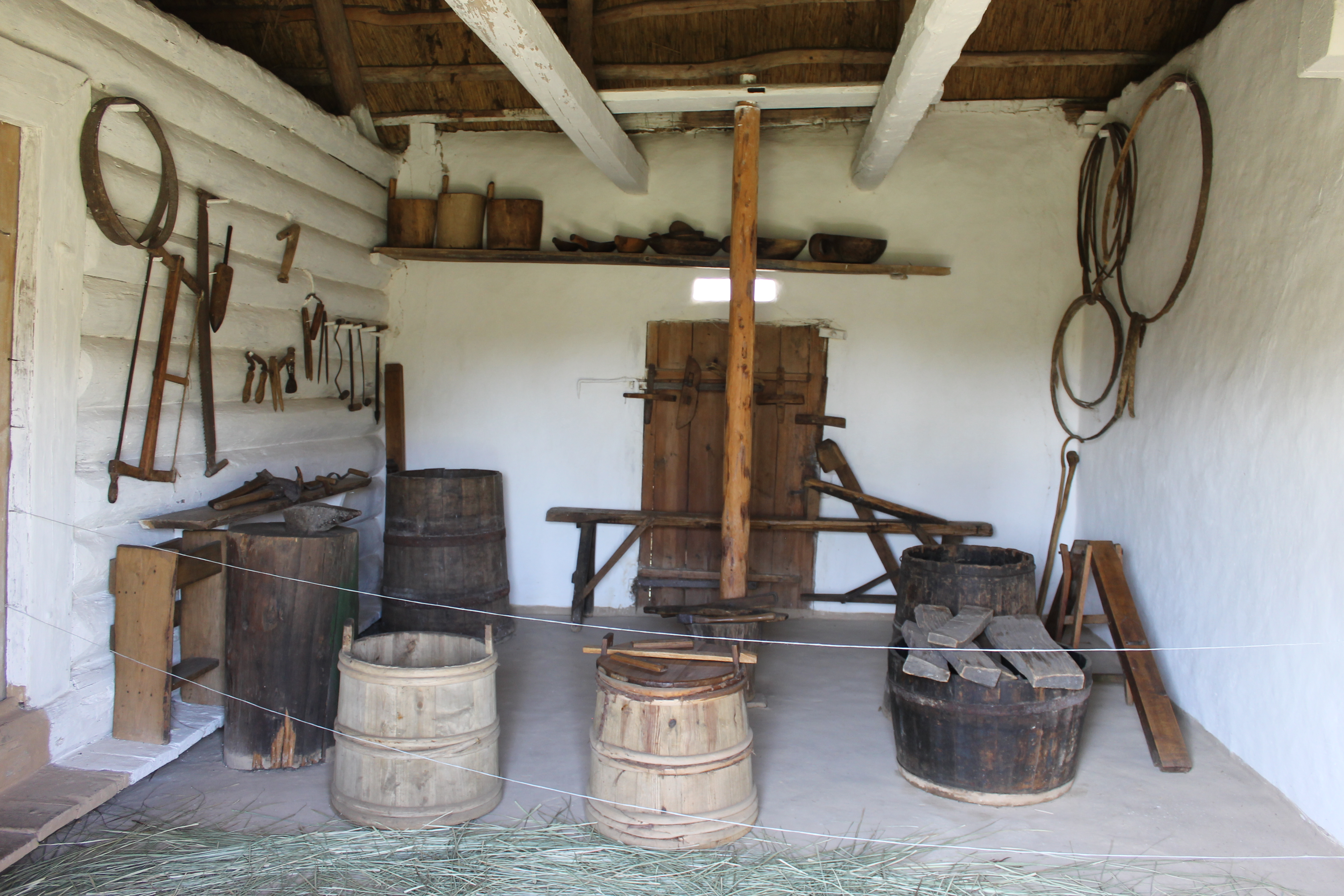 3. Інтер’єр майстерні бондаря., Комплекс споруд «Двір бондаря»